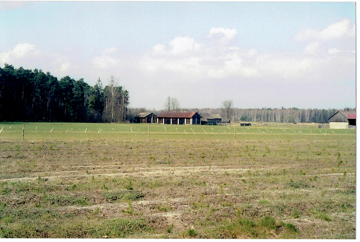 Gospodarstwa w Stasiowym (moje zdjęcie)